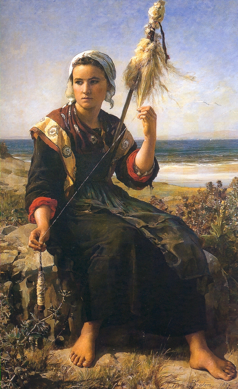 Fileuse